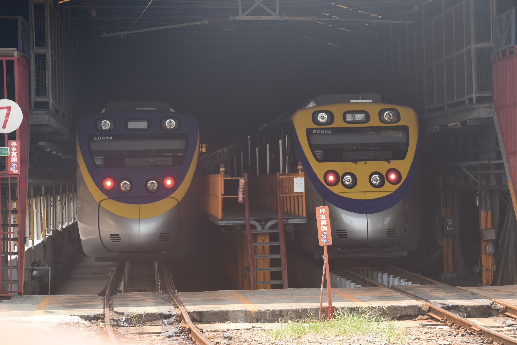 EMU853+854 & EMU881+882 新竹機務段